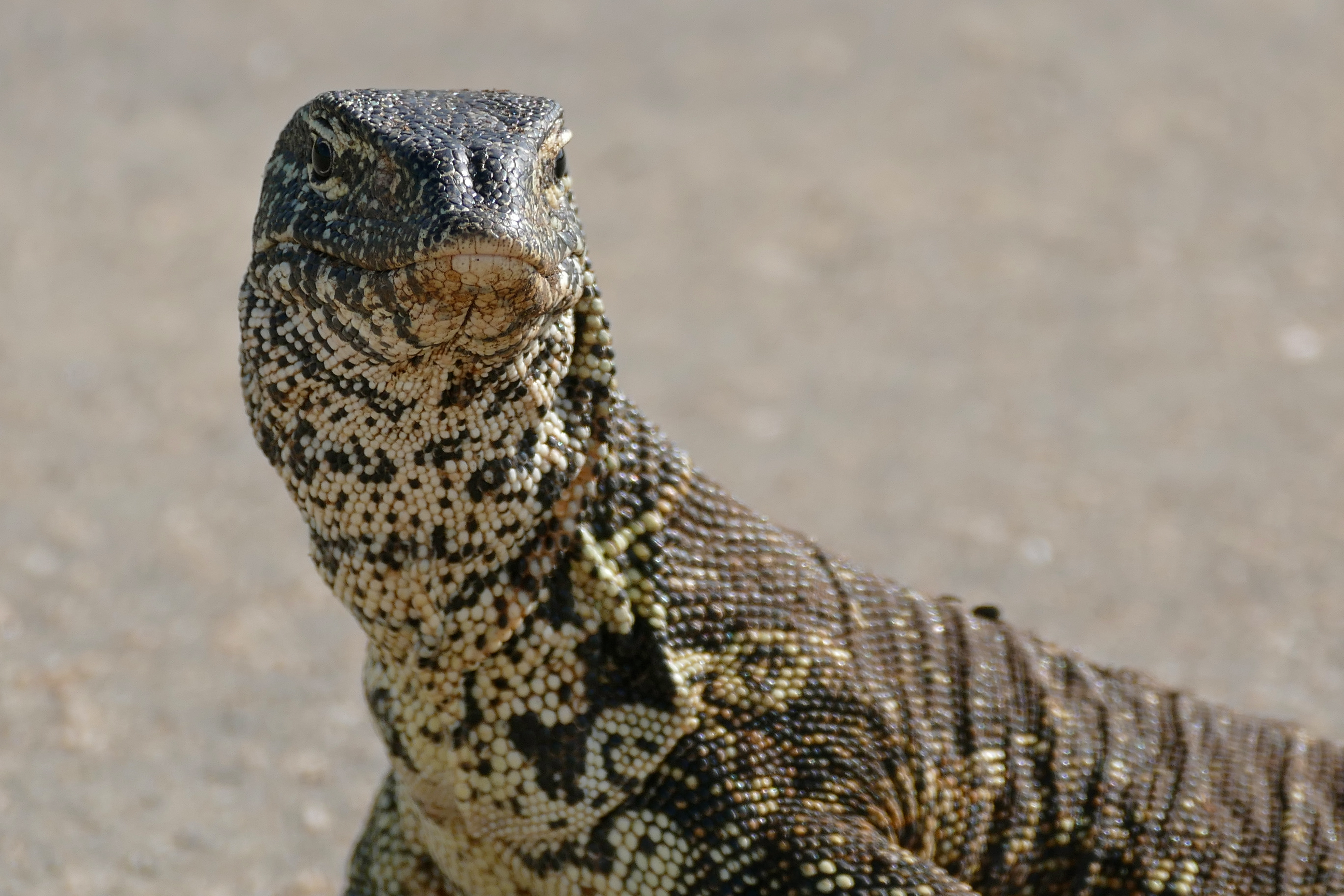 Sunset Dam, Lower Sabie, Kruger NP, SOUTH AFRICA